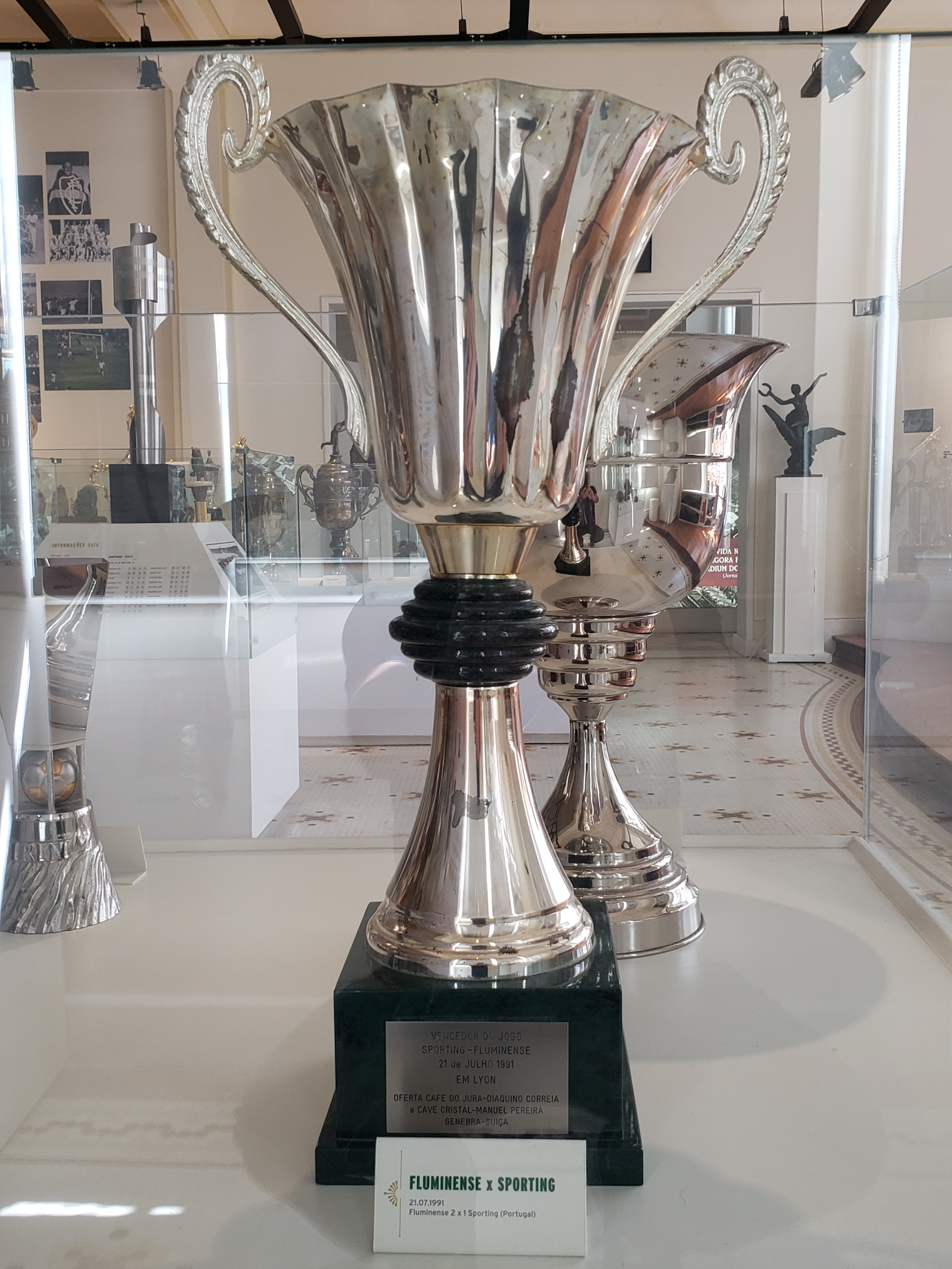 Taça Sporting versus Fluminense, disputada em Lyon, França, em 21 de julho de 1991, ofertada por Cafe do Jura e Cave Cristal, de Genebra, Suíça.